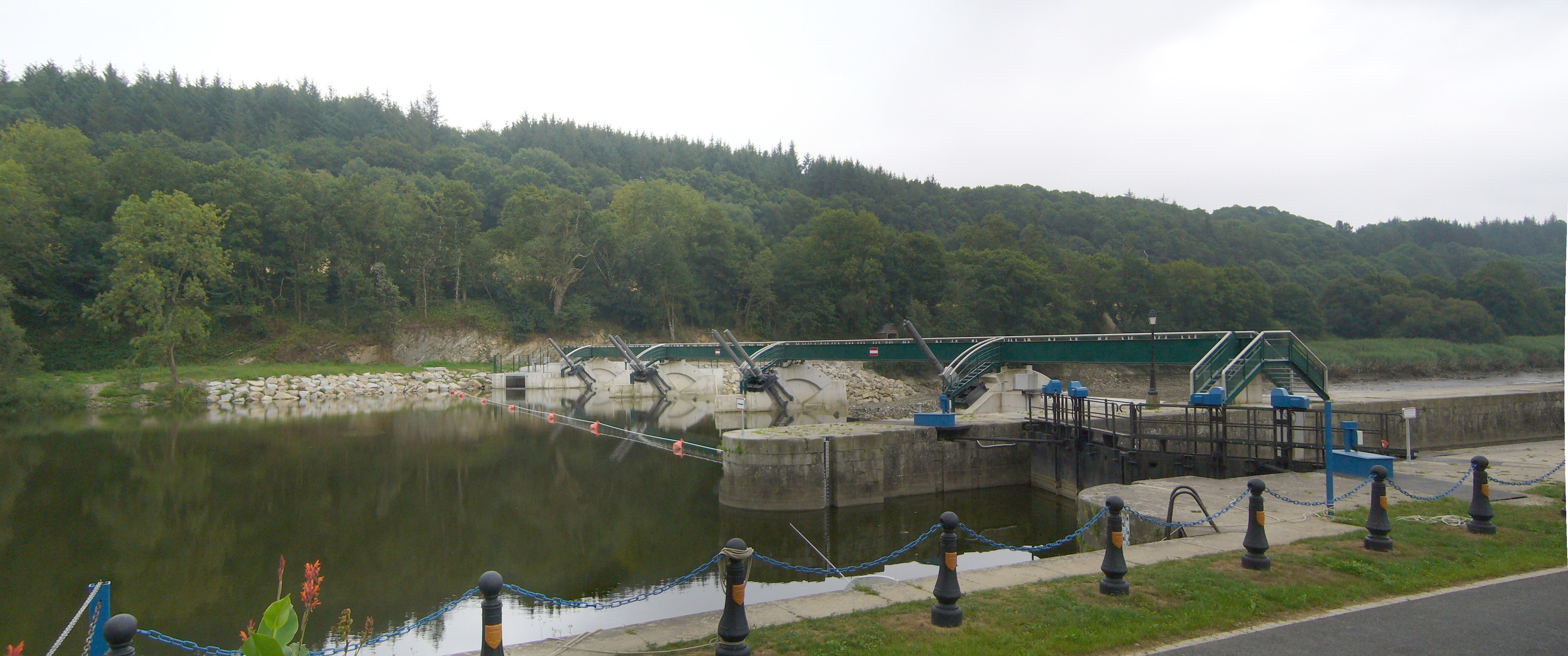 Port Launay's mobile's barrage: Auteur: Utilisateur:Suaudeau